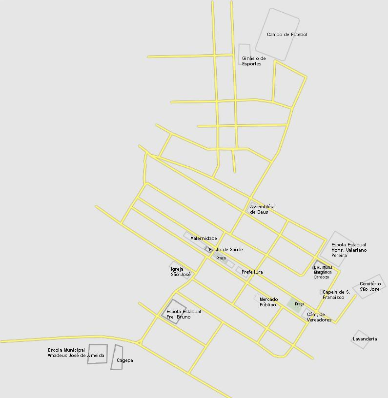 Mapa de Lagoa